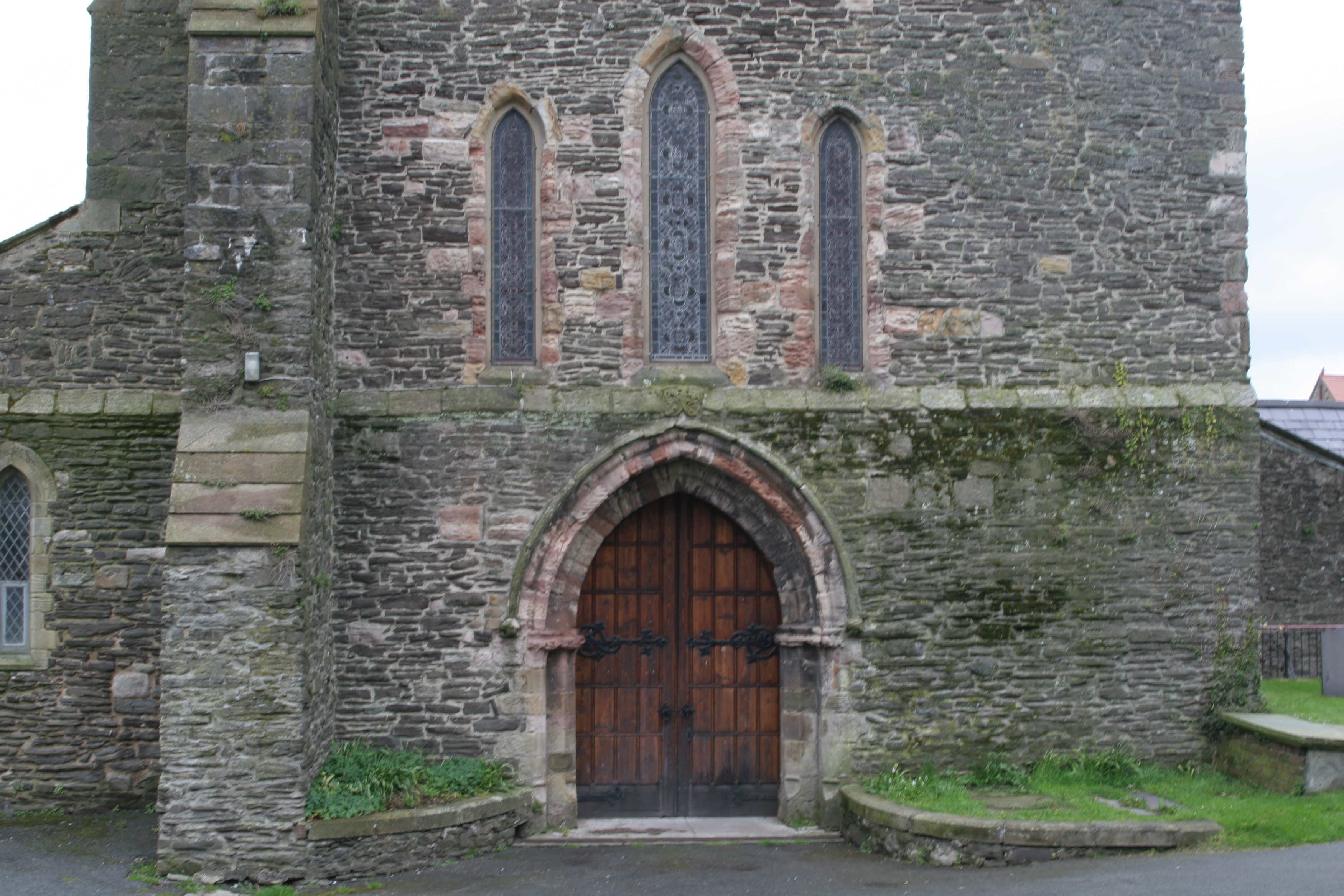 Eglwys y plwyf, Conwy / Parish church, Conwy own work, 01/05/2006 Rhion Pritchard